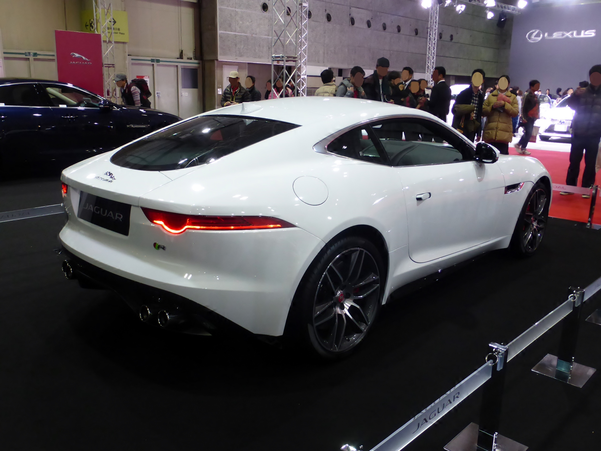 大阪モーターショー2013のジャガーブースにおいてFタイプRクーペを撮影。